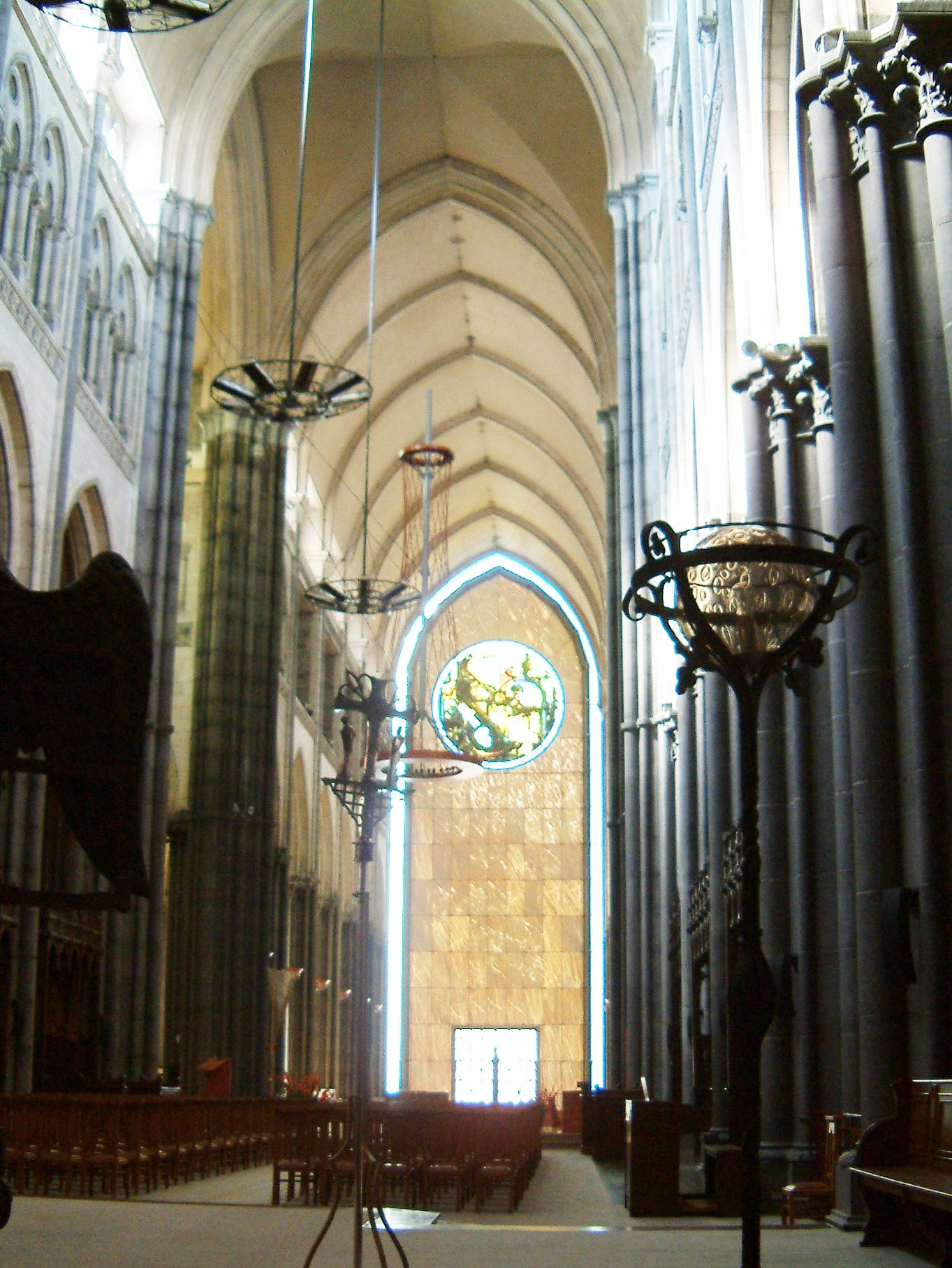 Cathédrale Notre-Dame-de-la-Treille de Lille, Lille, Nord, FRANCE